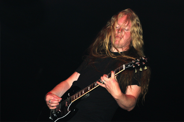 Primordial am 26. Mai 2007 im Leipziger Kohlrabizirkus (Wave-Gotik-Treffen)